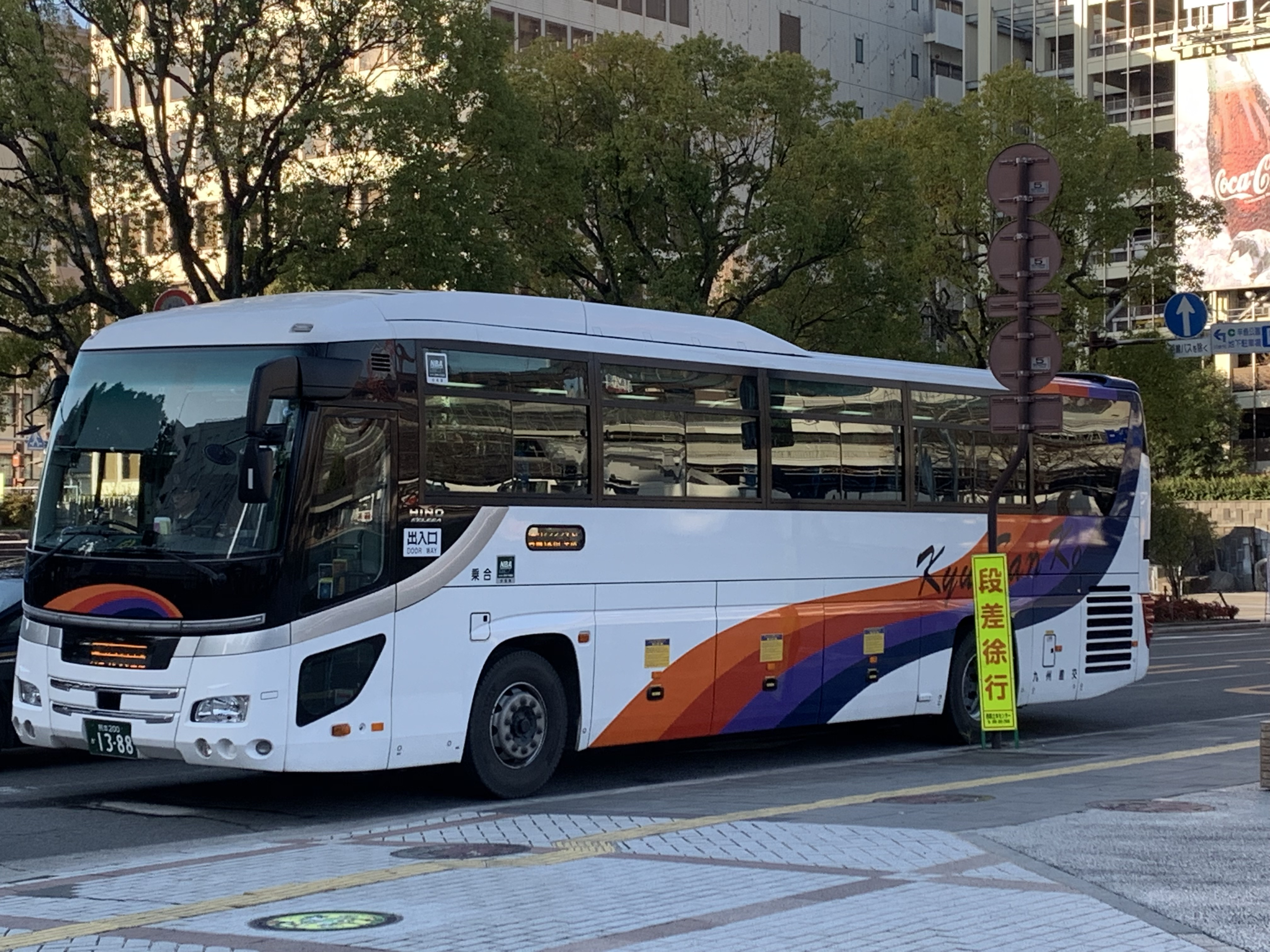 九州産交バス、熊本200 か 1３88 車種：日野セレガジェイバス車体。 熊本交通センターにて撮影